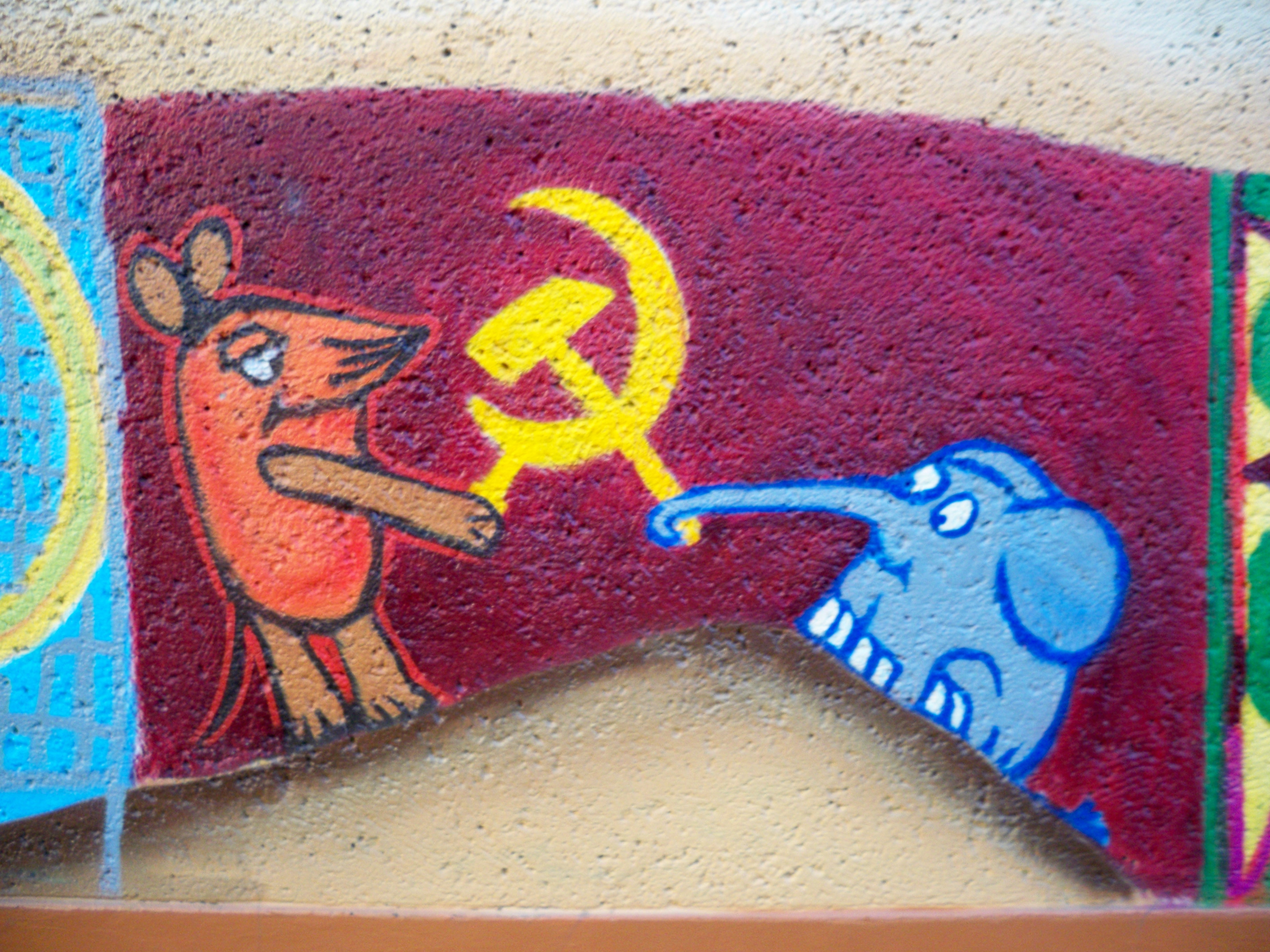 Street art in Jena: Die Sendung mit der Maus